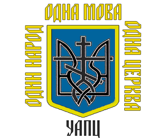 Герб Української Автокефальної Православної Церкви